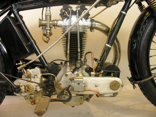 Zürcher Engine 350 cc 1929